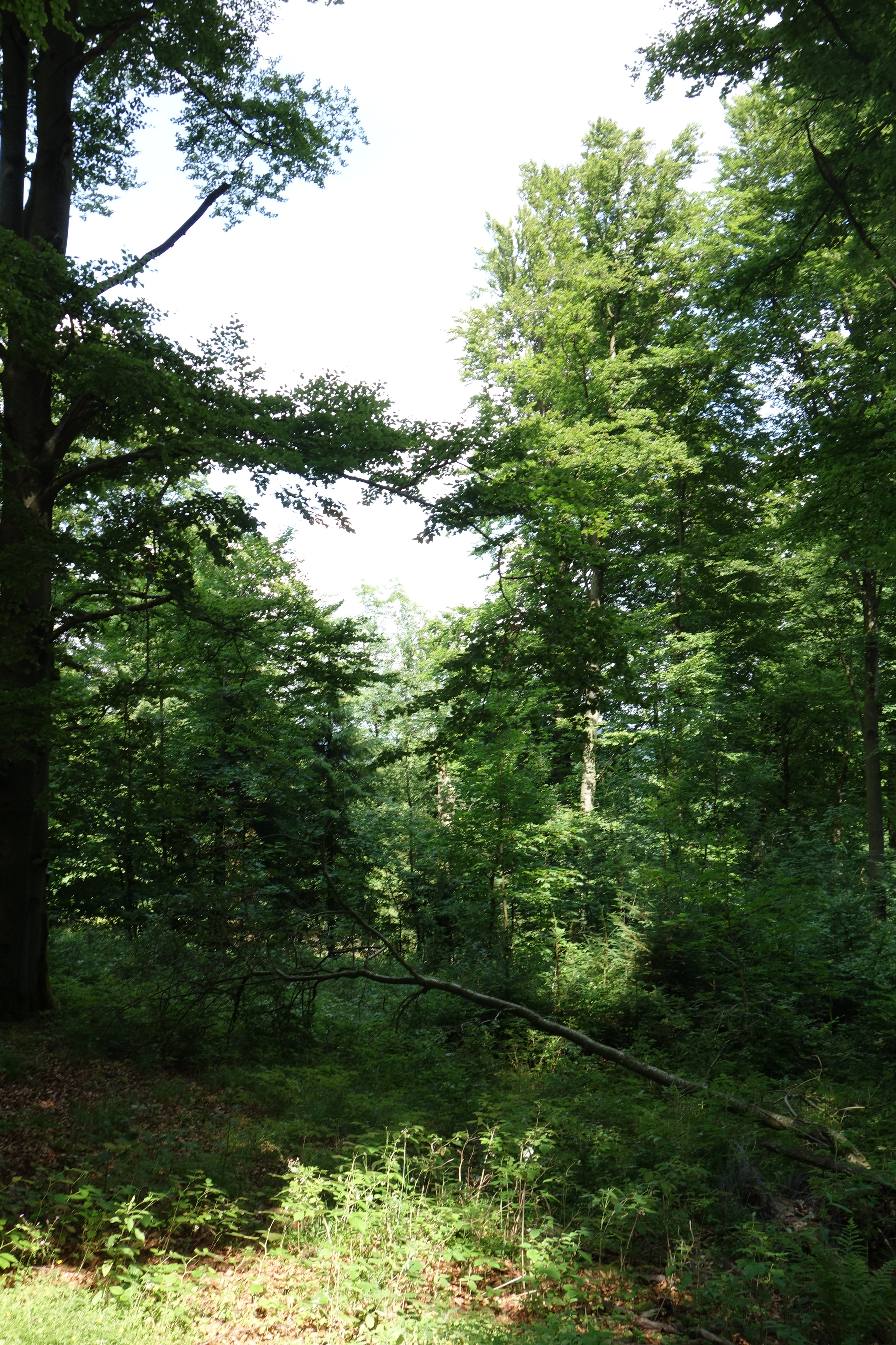 Blick ins Naturschutzgebiet Steinmarkskopf-Hardenberg (Südfläche).